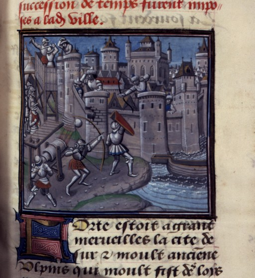 Siège de Tyr (1124)